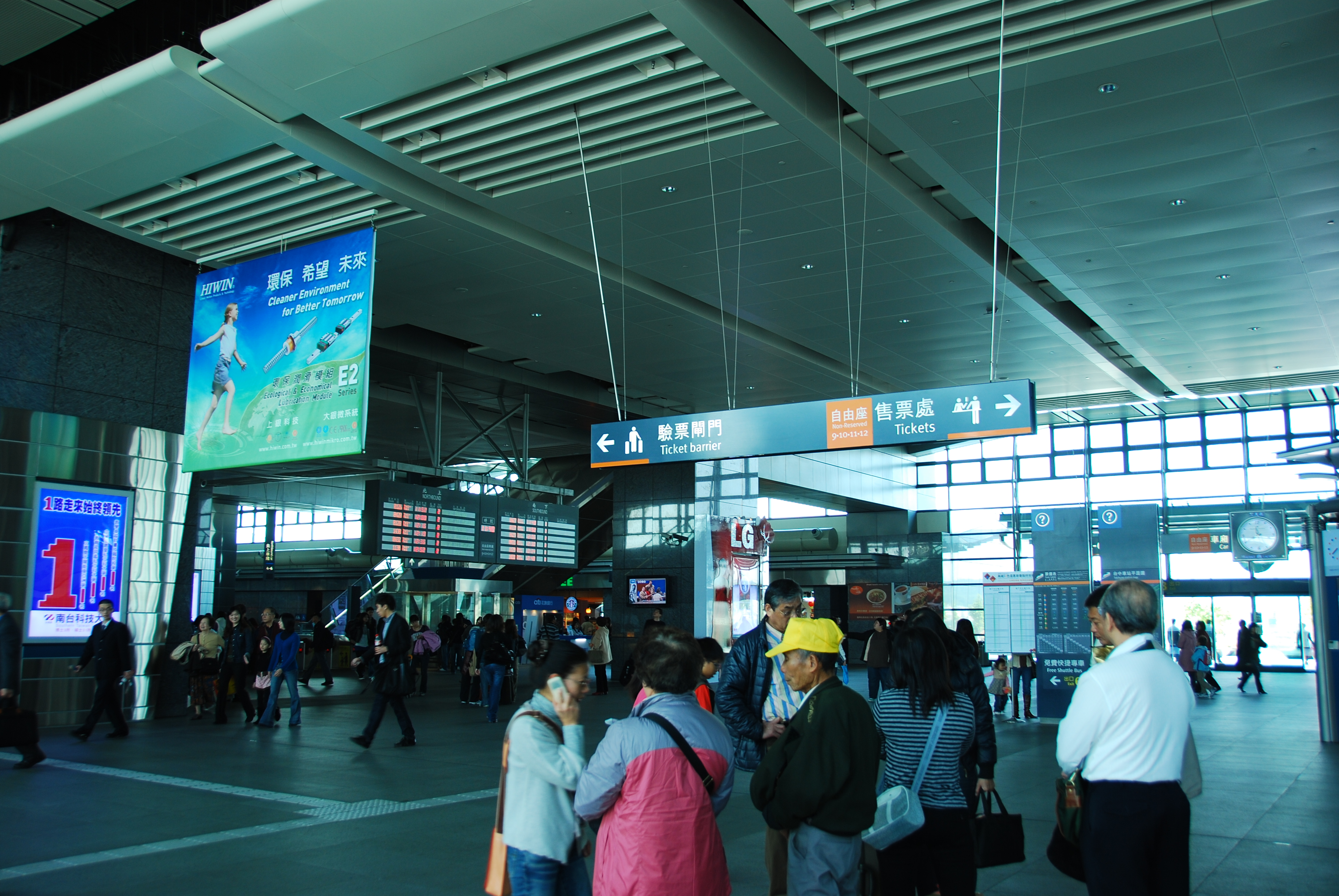 高鐵台中站大廳。